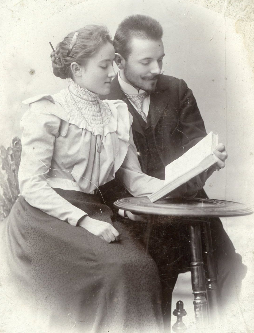 Kamilla i Antoni Chołoniewscy w roku 1900